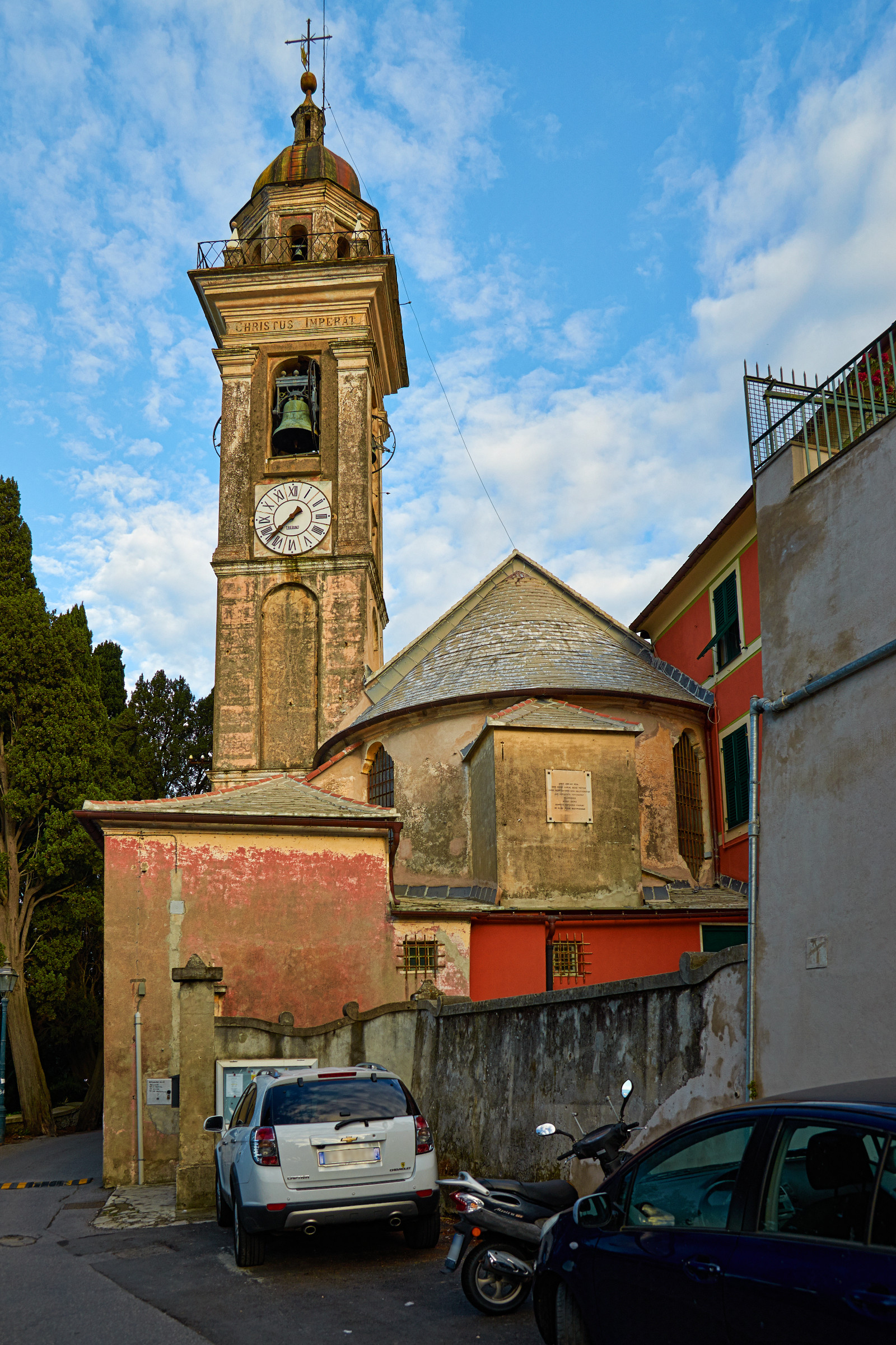 Chiesa di Sant'Ilario, retro